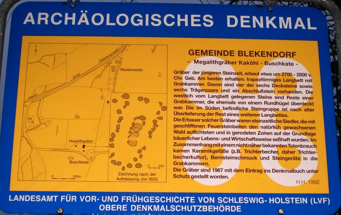 Megalithgräber bei Kaköhl - Schild